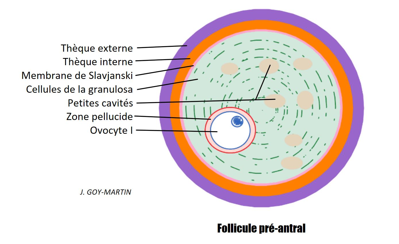 Follicule pré-antral avec thèque interne, externe, membrane basale, cavités, ZP, ovocyte I. De J. GOY-MARTIN